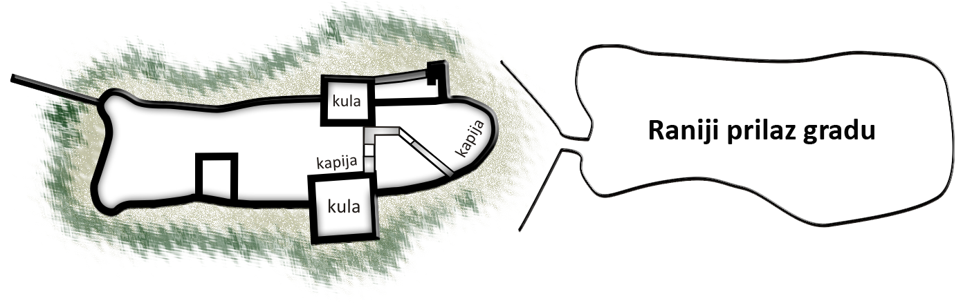 Tlocrt srednjovjekovnog grada i tvrđave Visoki Plan of the royal town Visoki Kula = Tower Kapija = Gate Raniji prilaz gradu = Early path to the gates of town